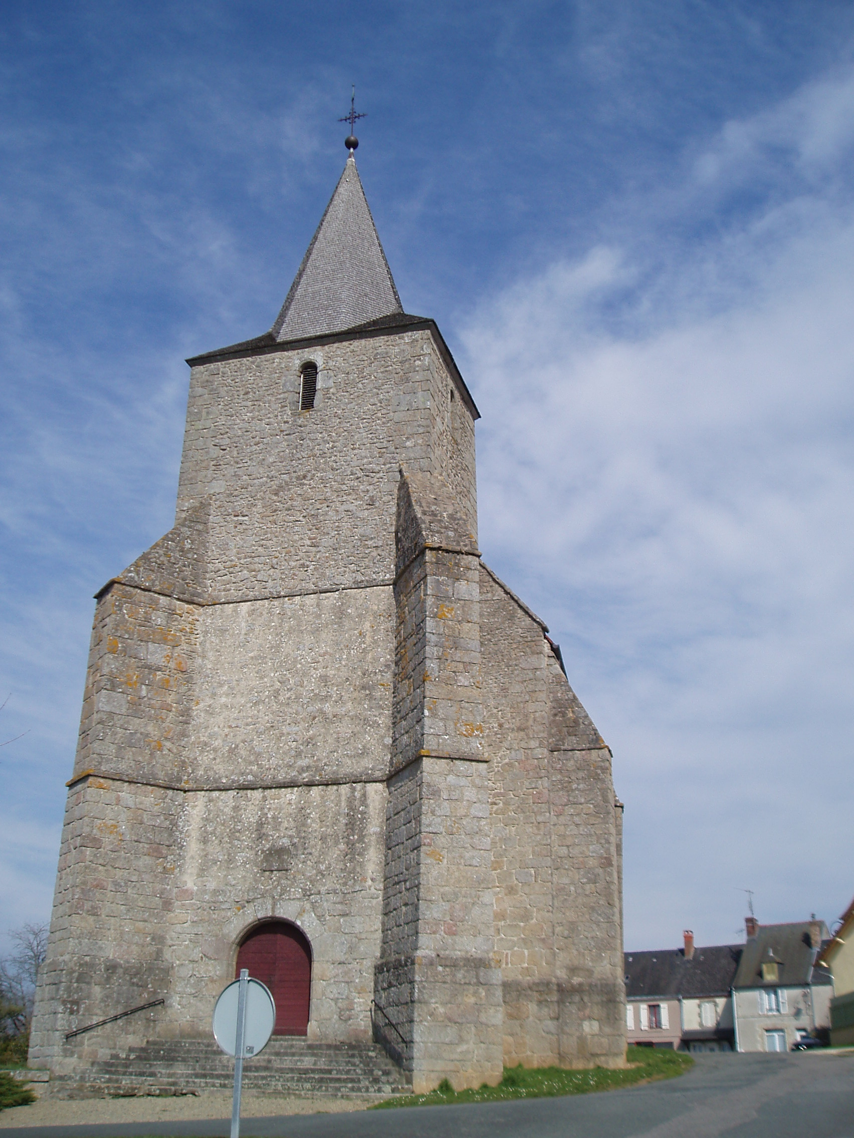 église d'Azerables, Creuse, France